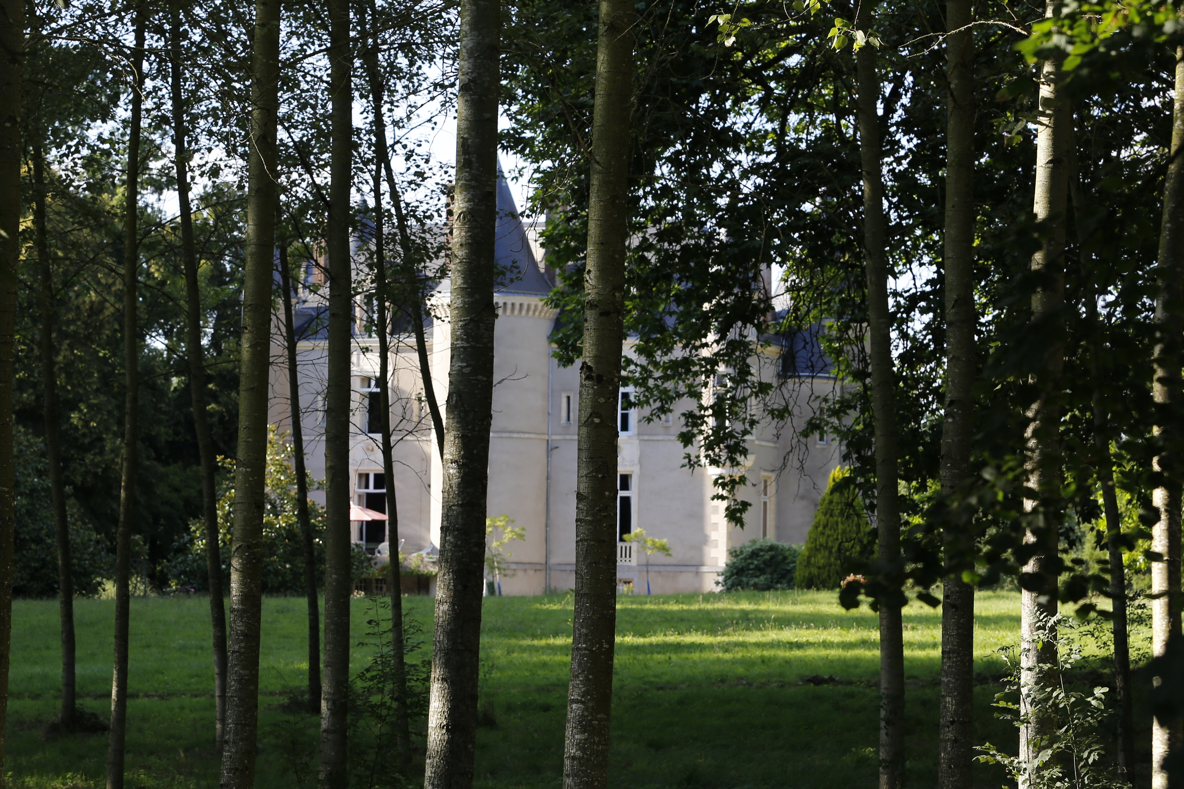 Le logis du Bois à Grazay. .